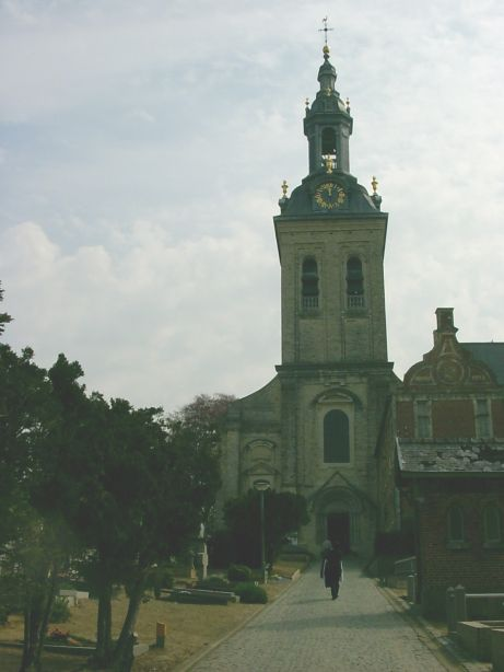 Abdij van 't Park, ook wel Parkabdij of Abdij van Park genoemd, is een Norbertijnerabdij gelegen in Heverlee bij Leuven. - eigen foto